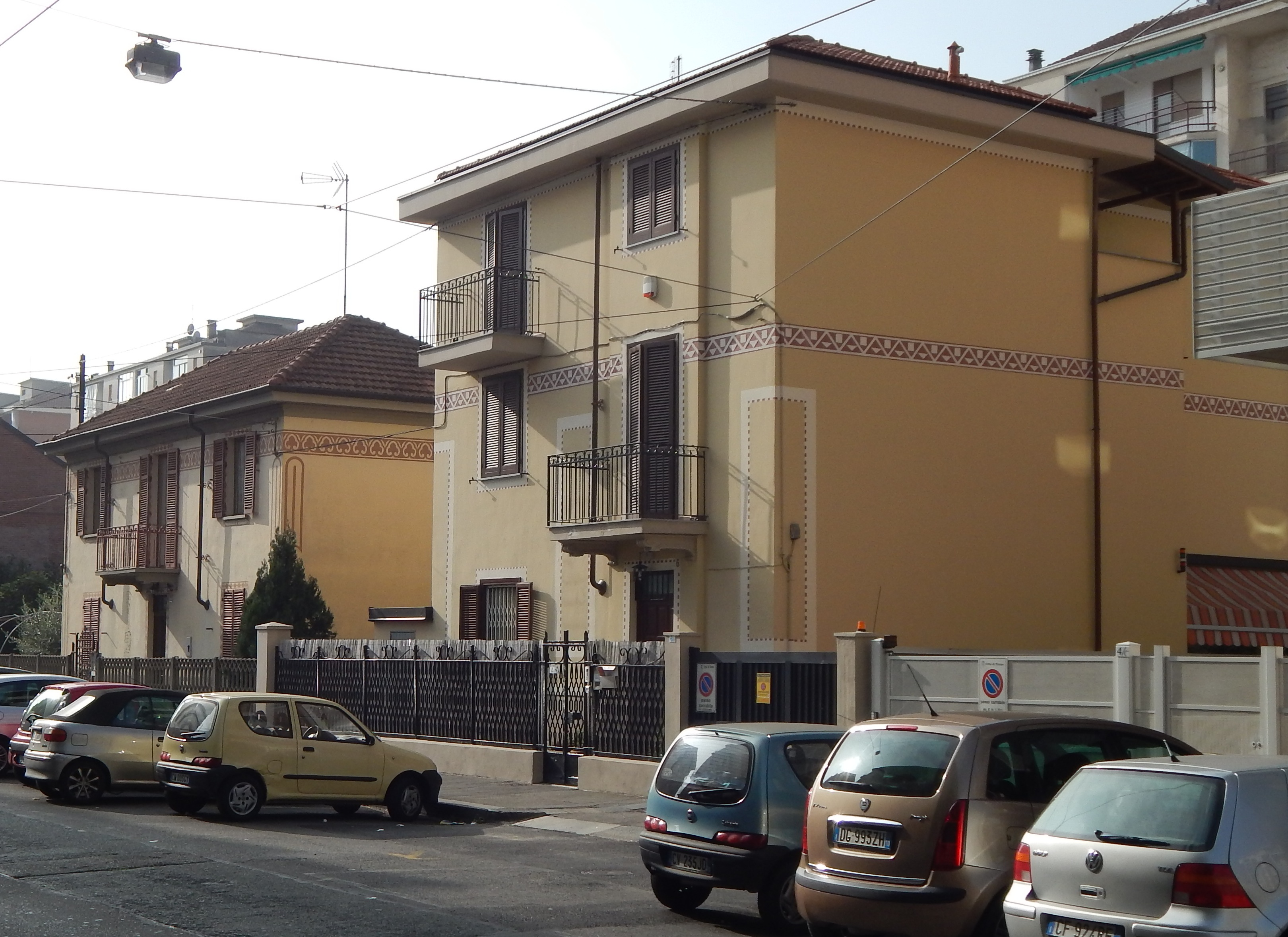 Una veduta di Borgata Lesna